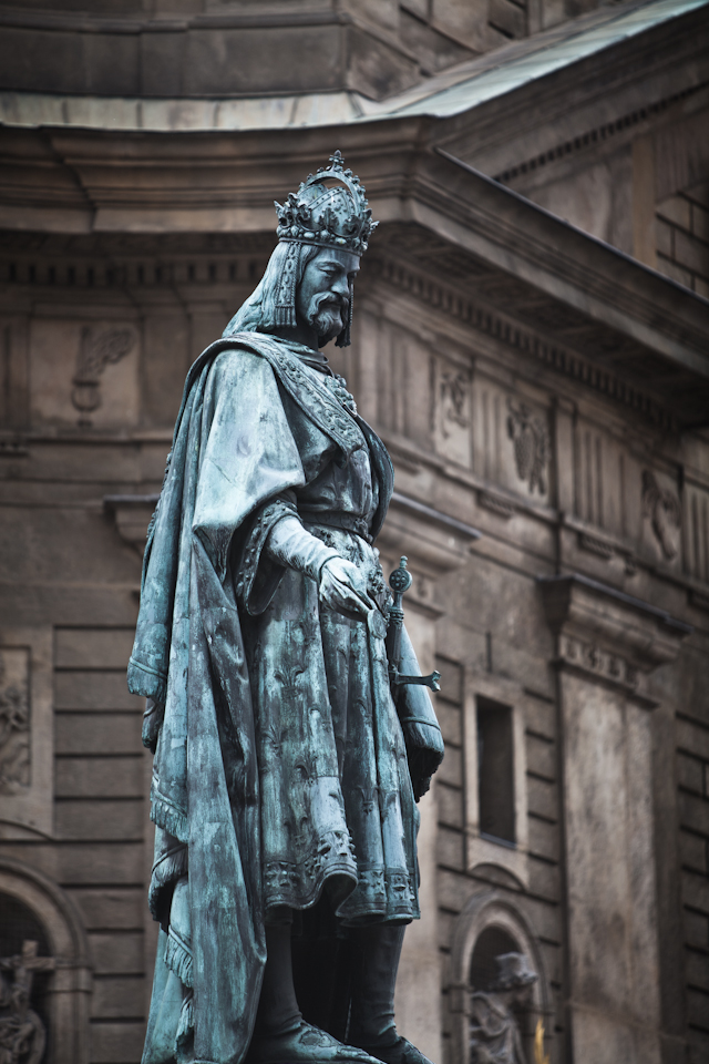 Памятник Карлу IV в Праге.